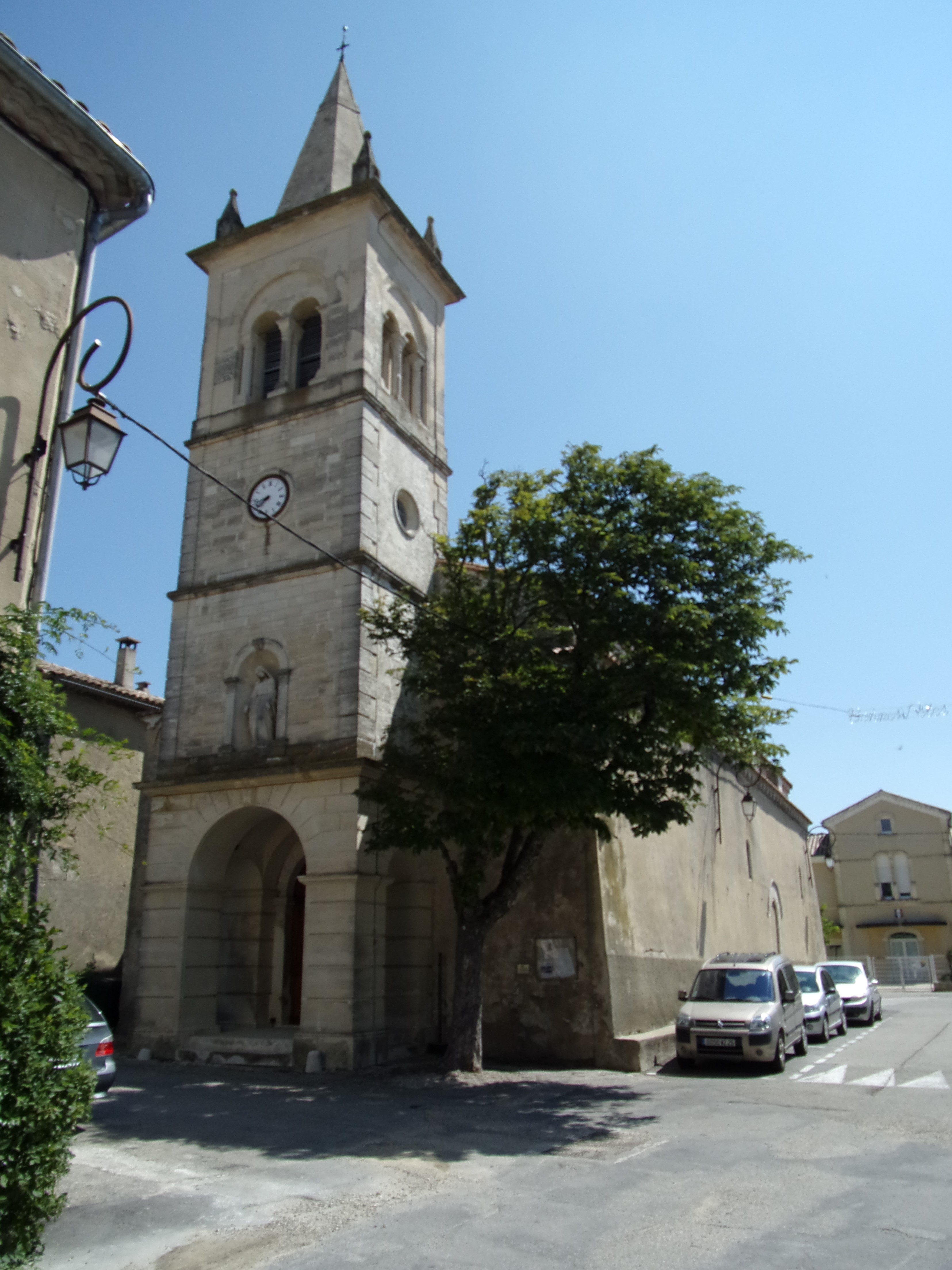 façade de l'église de Réauville